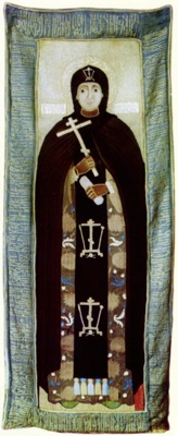 Русь. XVII (?). Прп. Евфросиния Суздальская. Шитая пелена. Русь. XVII (?) в. Фото С.М. Прокудина-Горского